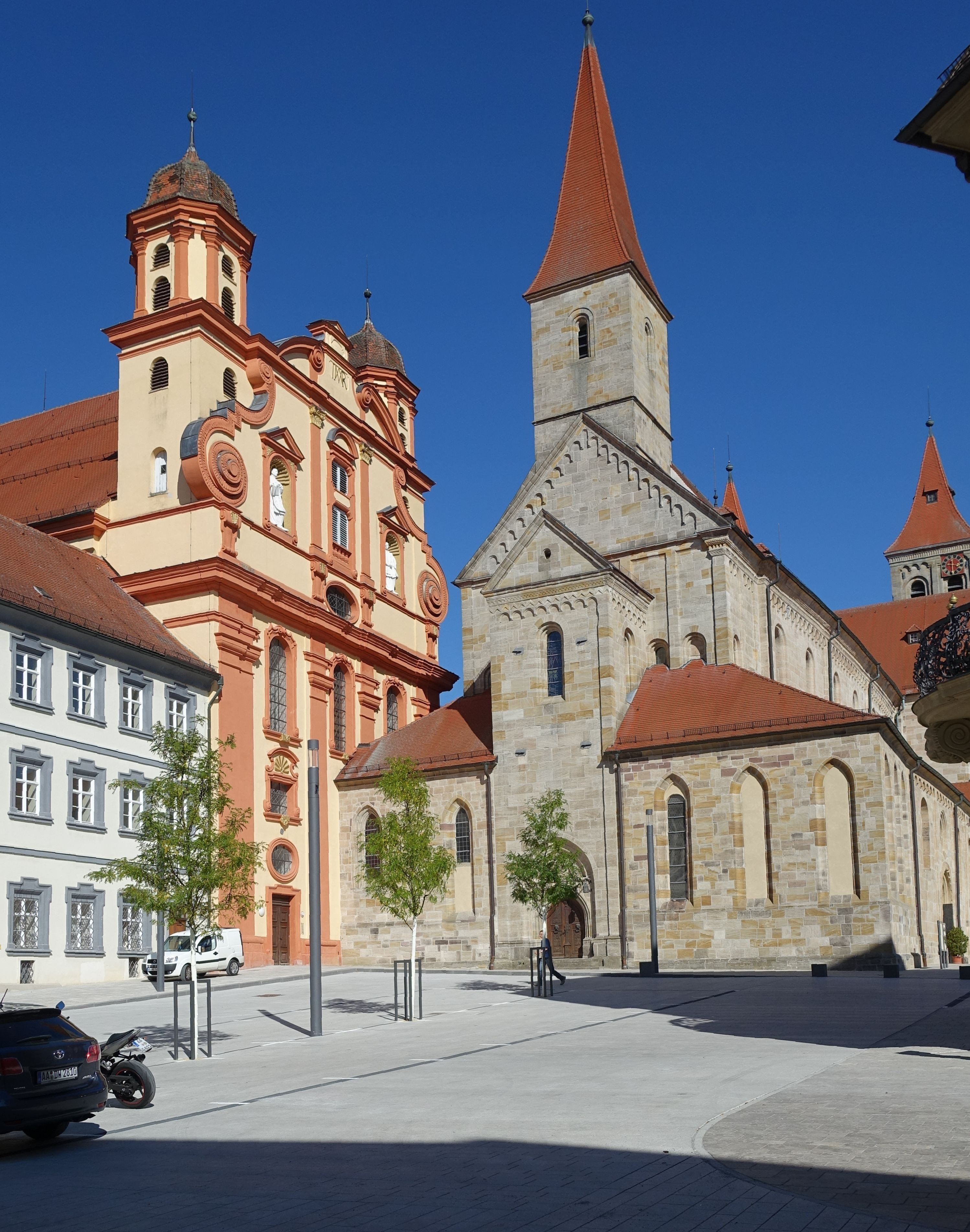 Ellwangen - Stiftskirche